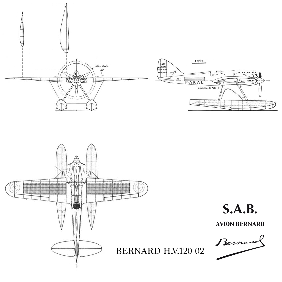 Plan 3 vues Bernard H.V.120/02 F.AKAL